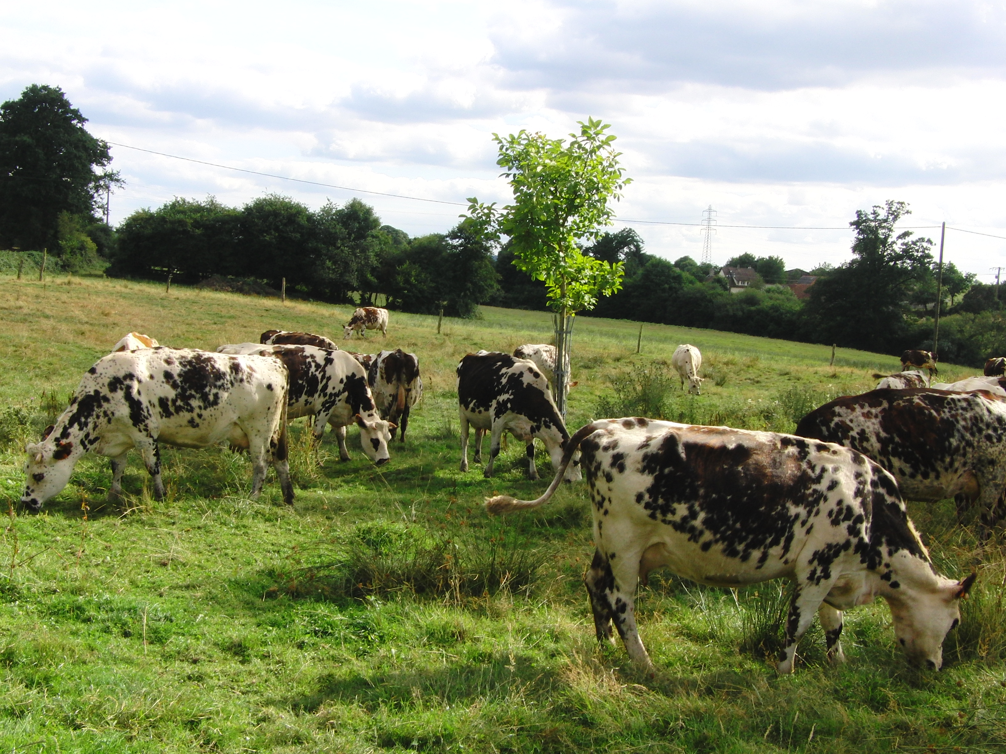 Troupeau de vaches normandes dans leur pré, Dompierre, Orne, France